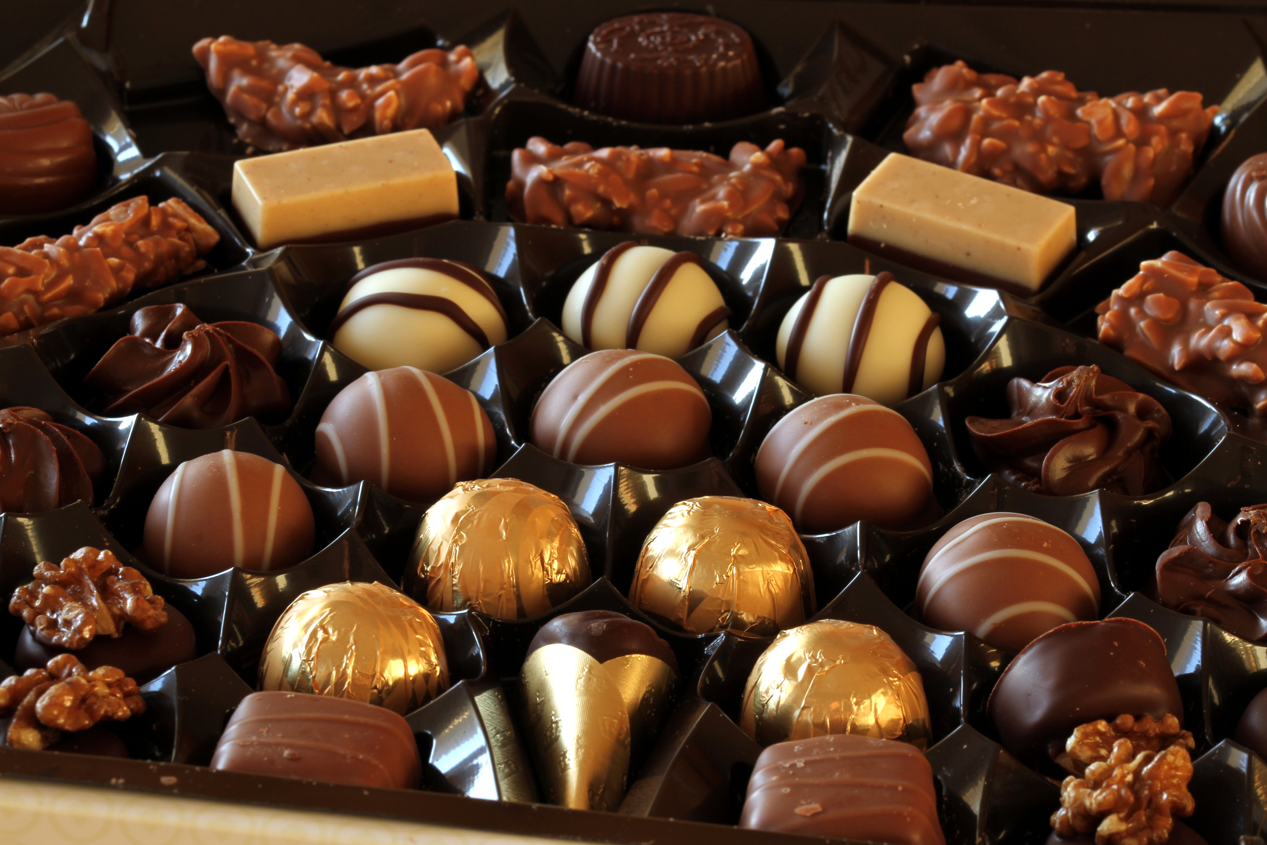 Kong Haakon-konfekt.